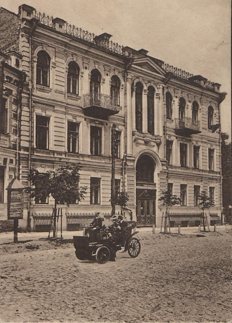 Жіноча гімназія у Луцьку в 1916 р.